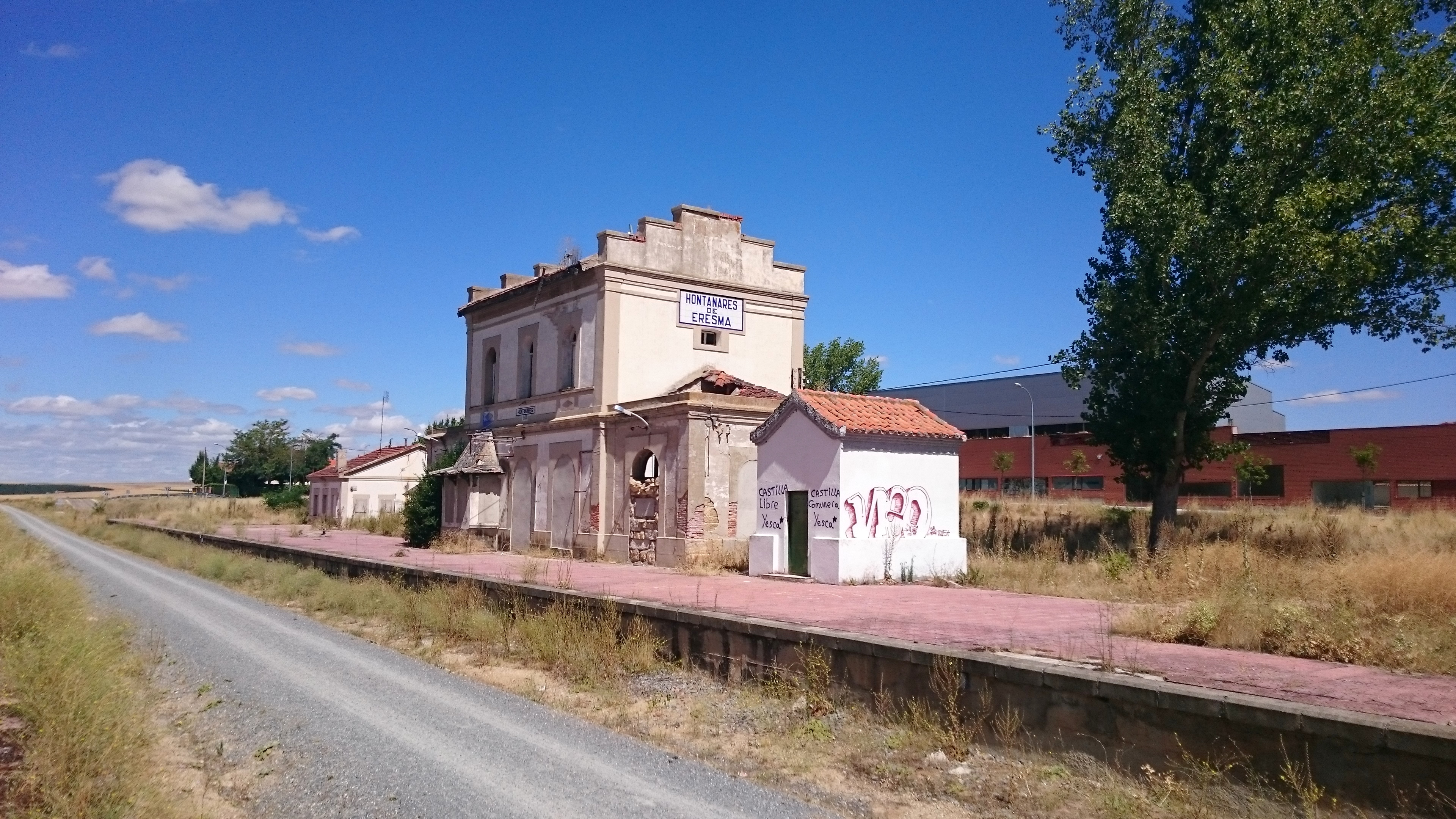 Antigua estación de la línea Villalba-Medina en Hontanares de Eresma